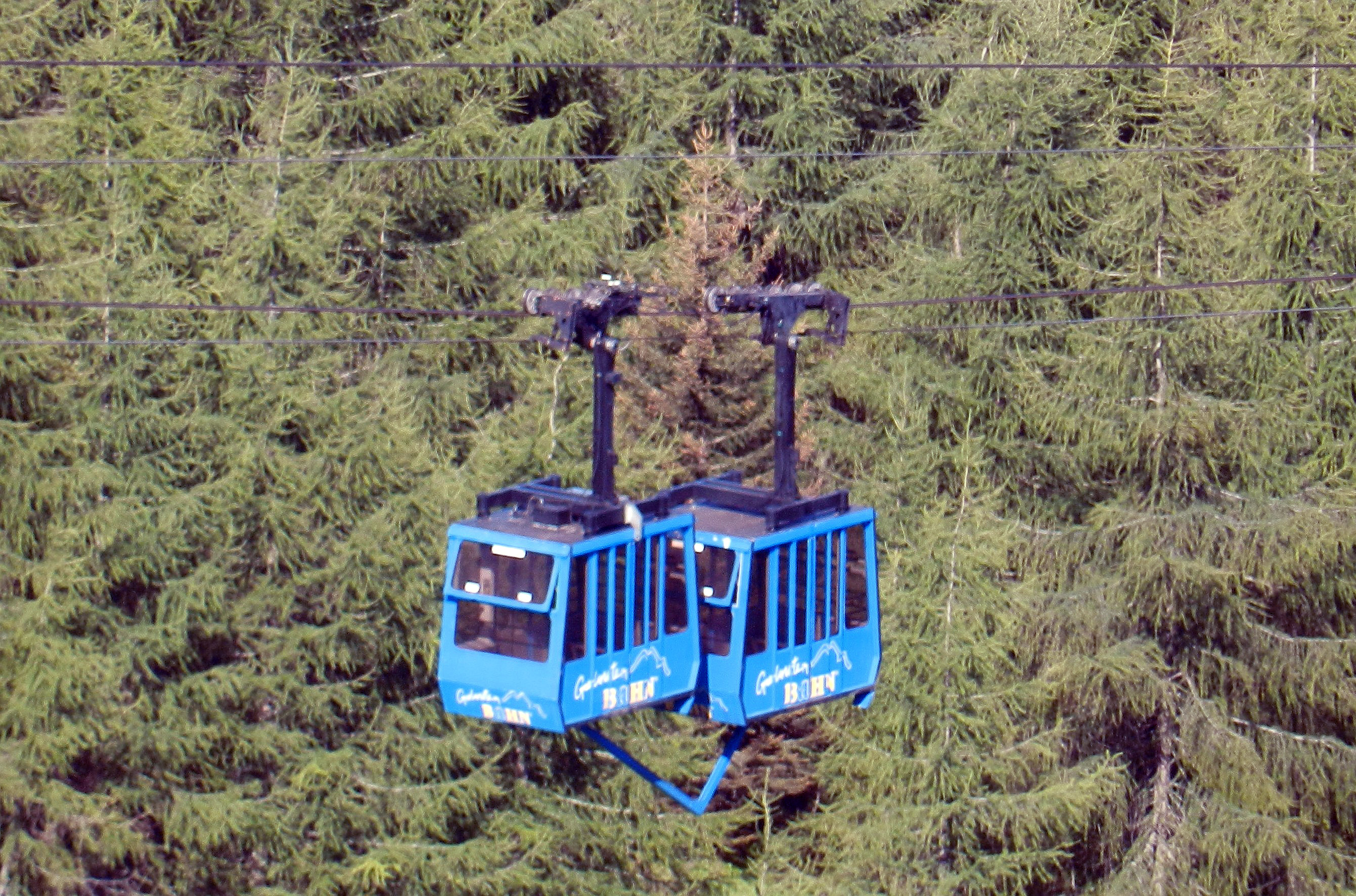 Gondel der Gerlossteinbahn (Zillertaler Alpen, Tirol, Österreich)